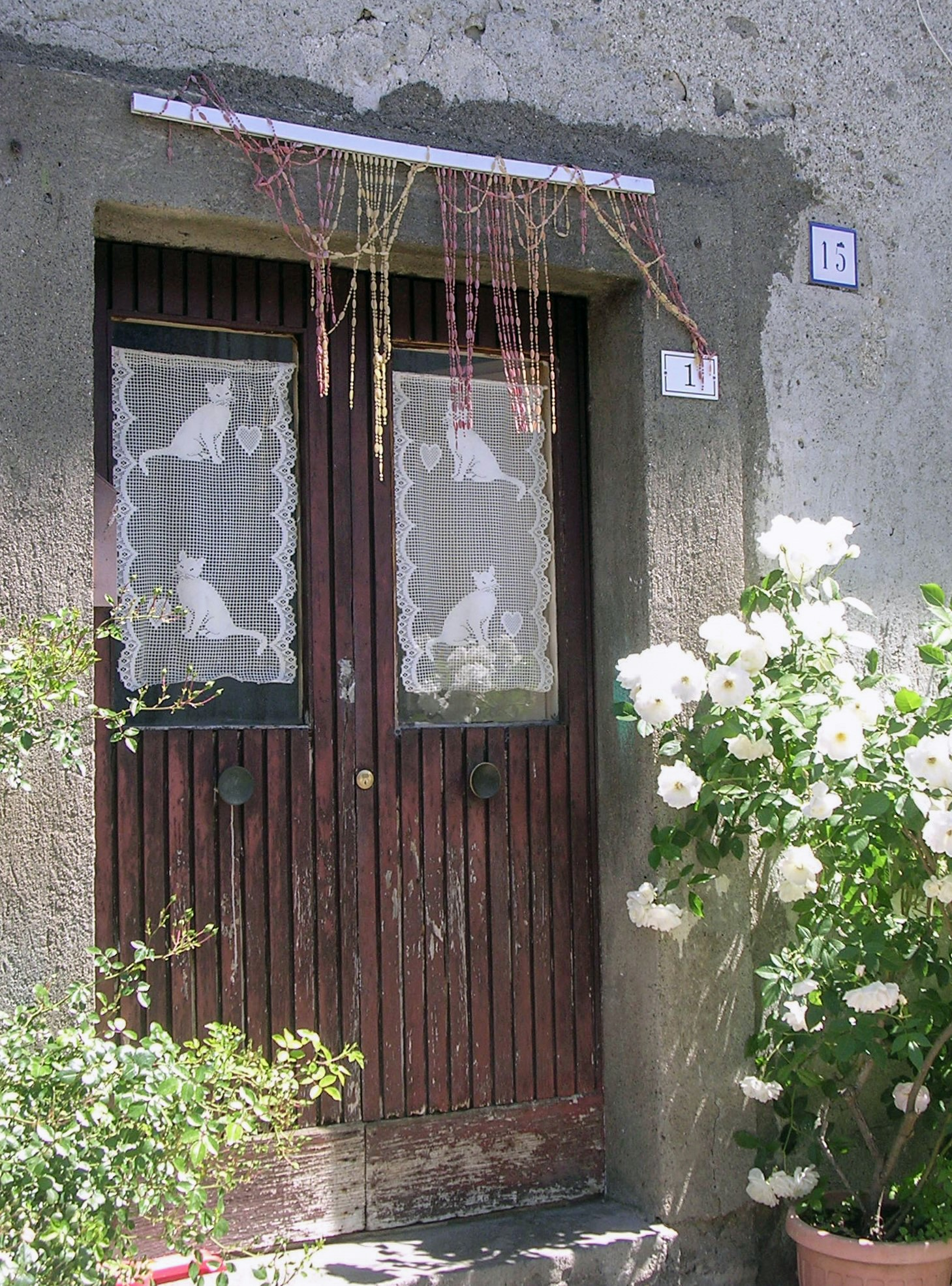 Porta con tendine, Castel Giuliano, Bracciano